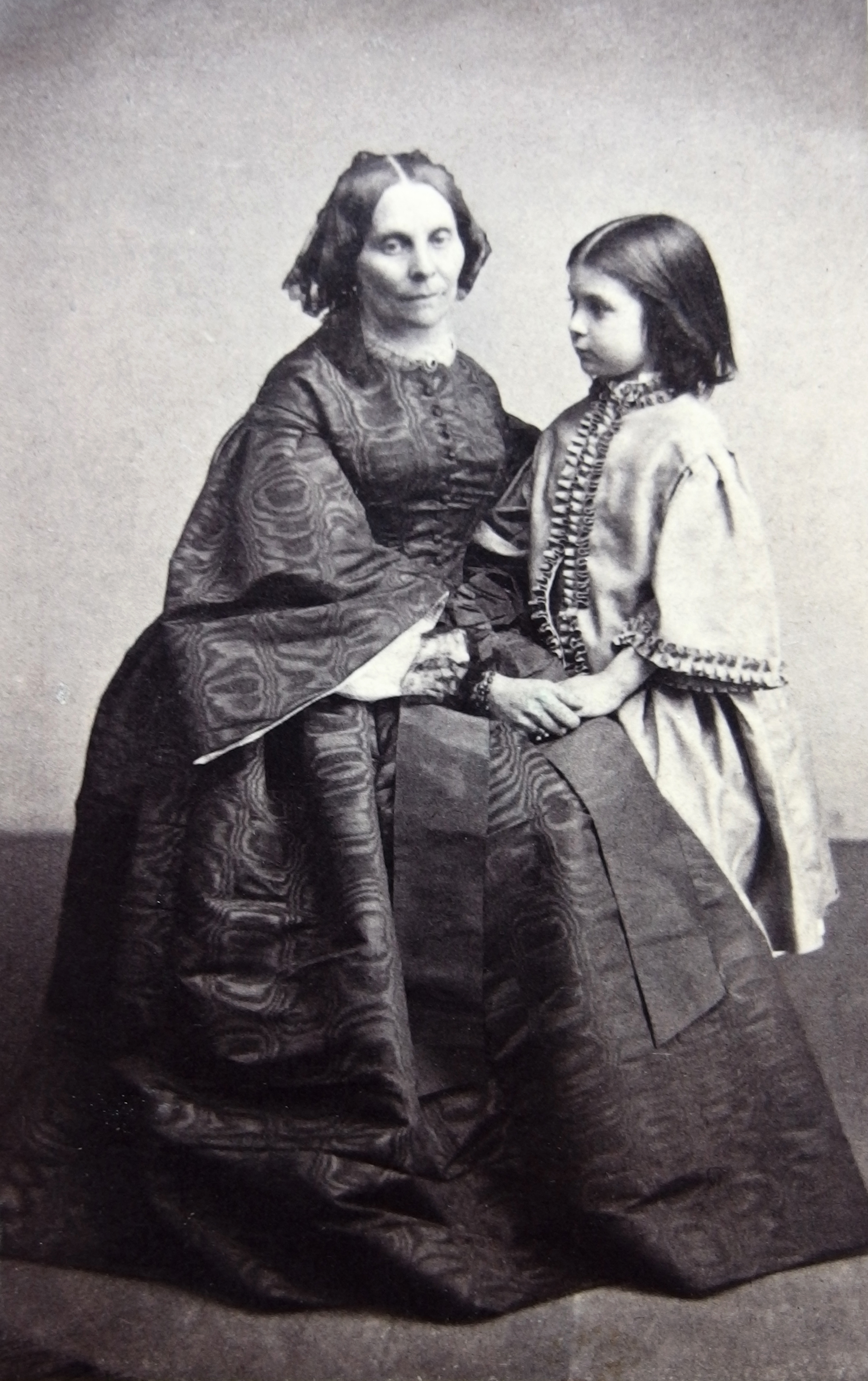 Elisabeth geb. Oppenheim, Gattin von August Grahl mit Enkelin Else, Tochter von Alfred Rethel, Dresden 1858